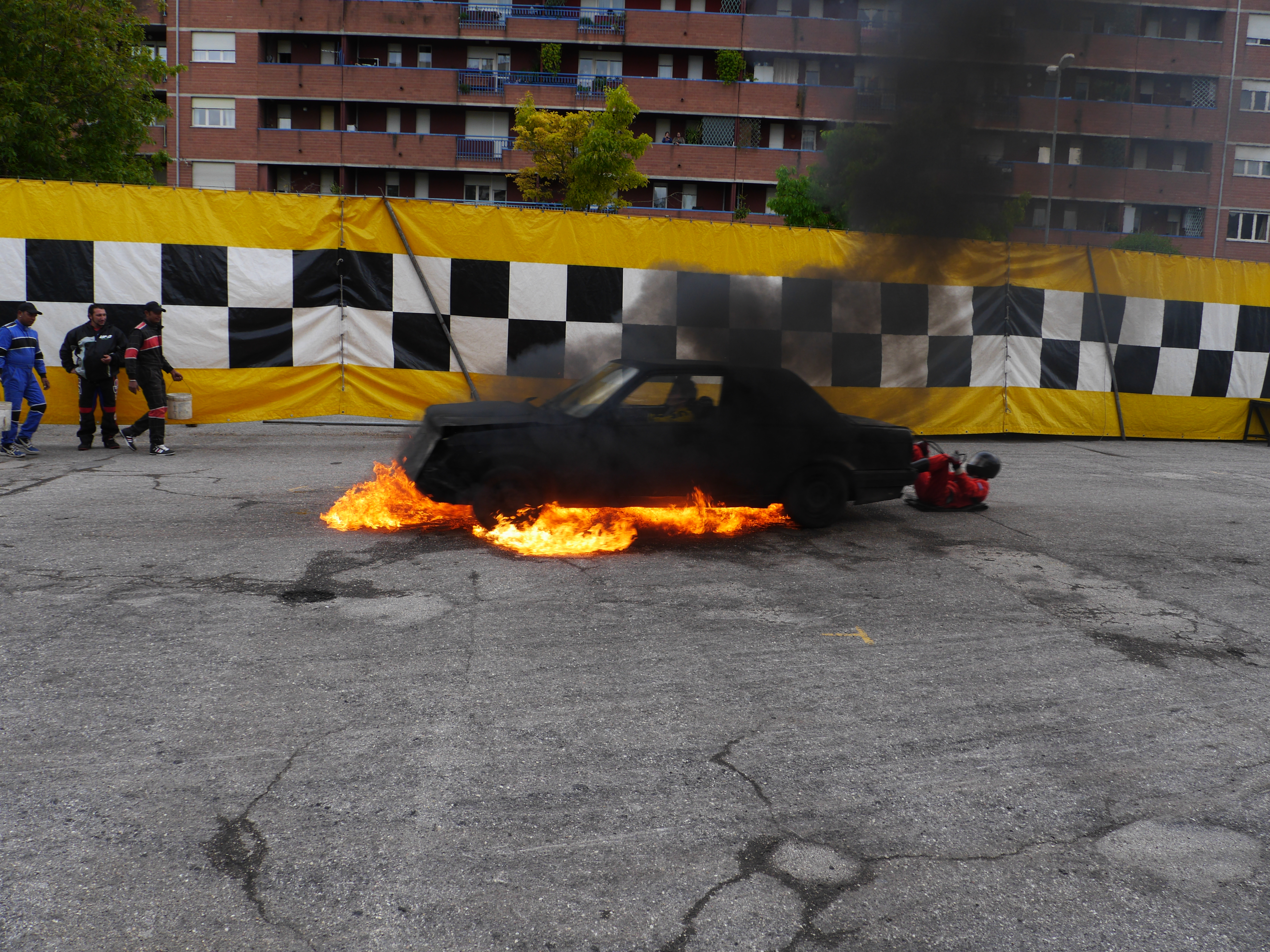 This photo was taken with Panasonic Lumix DMC-GH3 camera, thanks to Panasonic. You can see all photographs in category: Taken with Panasonic Lumix DMC-GH3.